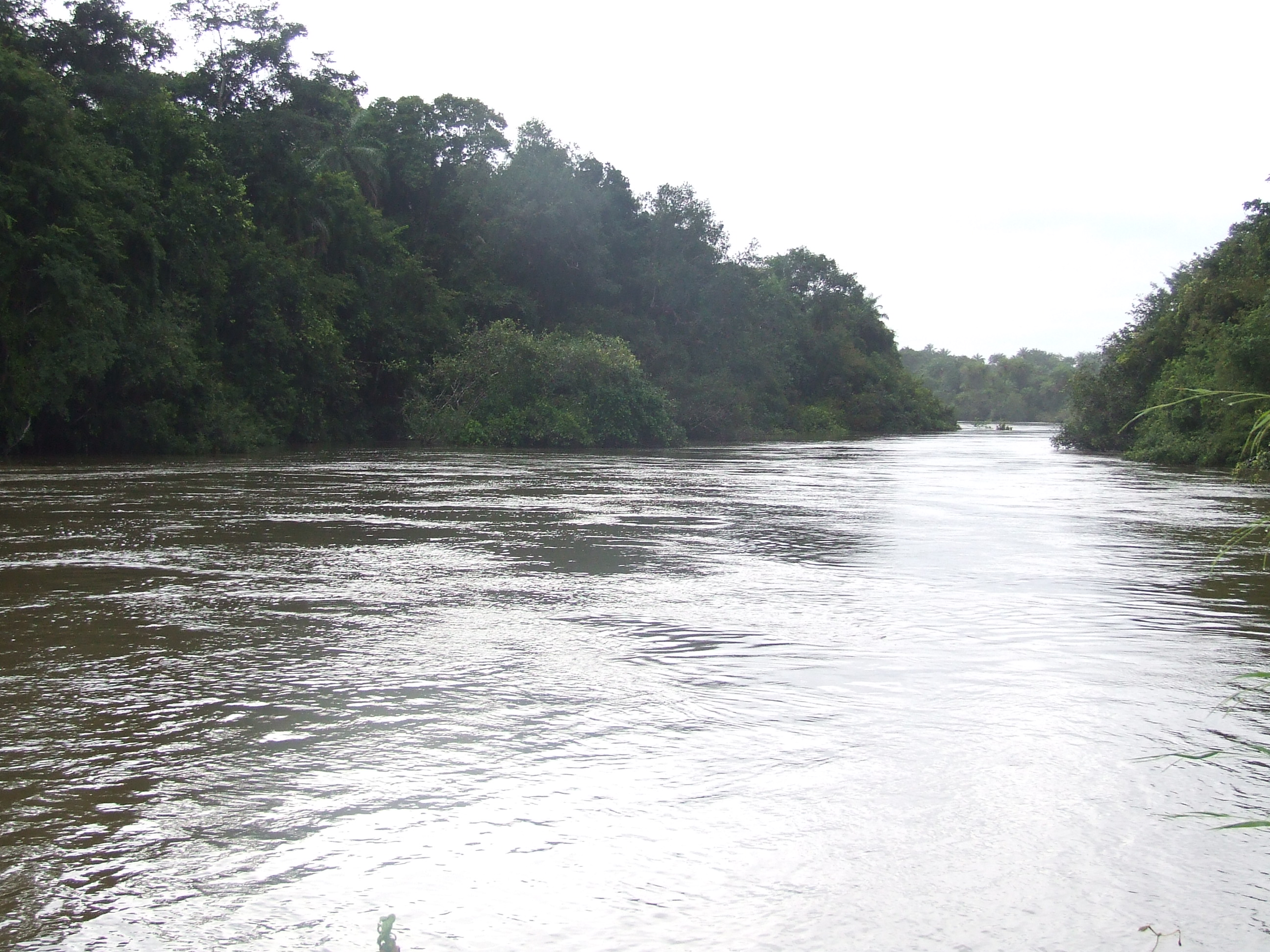 Rokel River, Sierra Leone